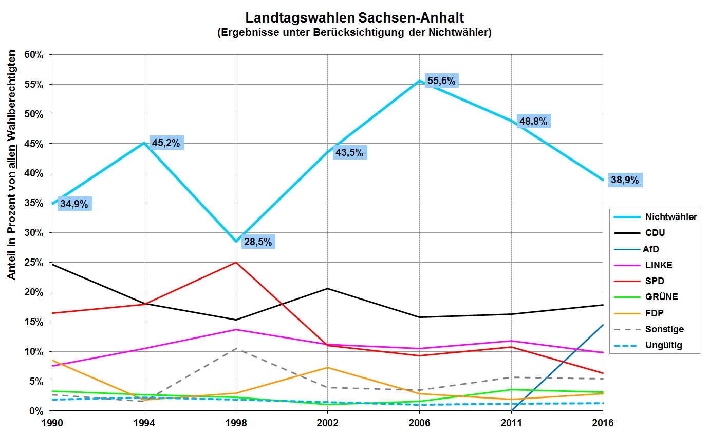 Historie des Anteils der Nichtwähler bei den Landtagswahlen in Sachsen-Anhalt